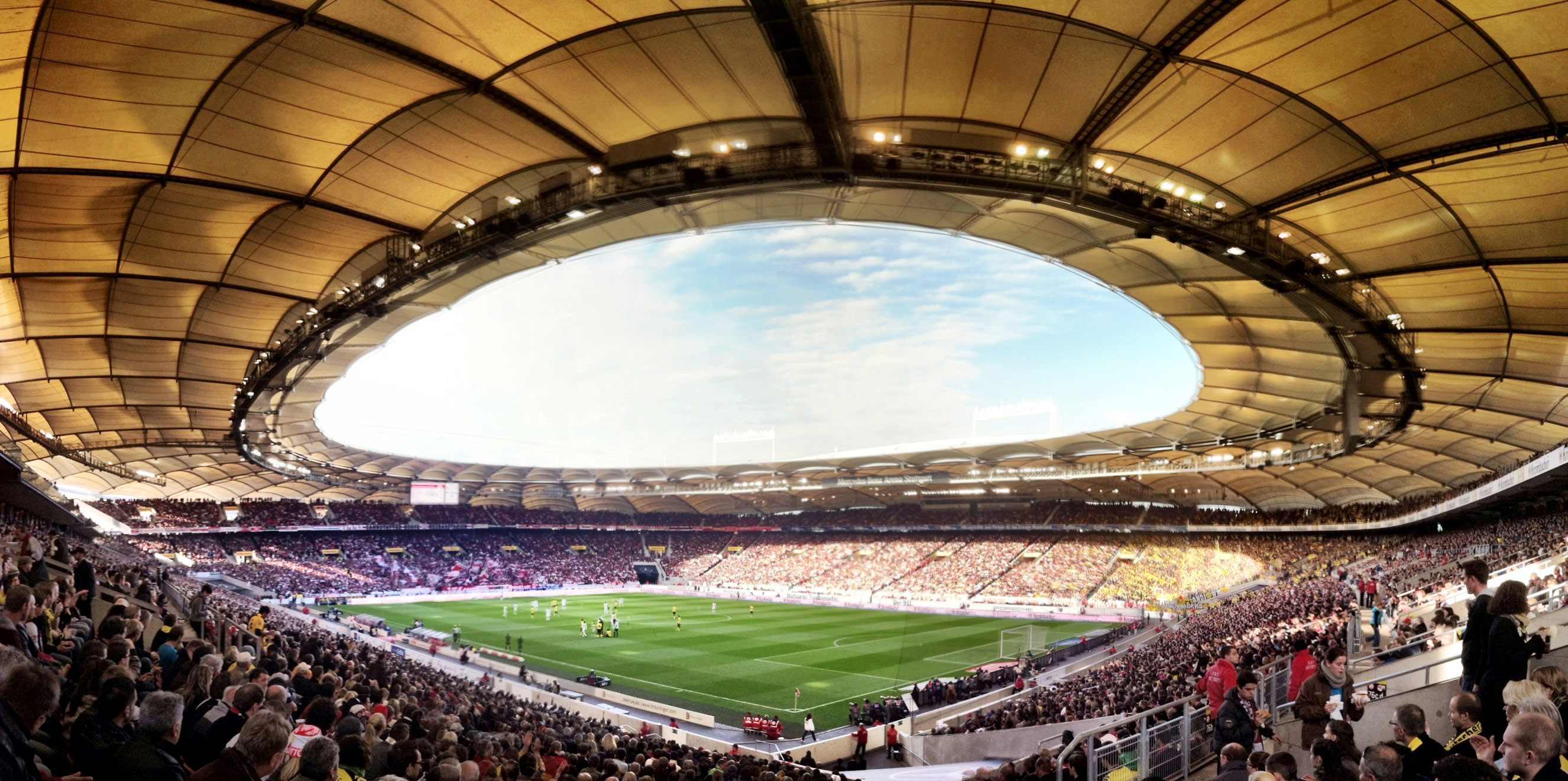 Mercedes-Benz-Arena (Panorama), Stuttgart; VfB Stuttgart - Borussia Dortmund 1:1; 29. Oktober 2011